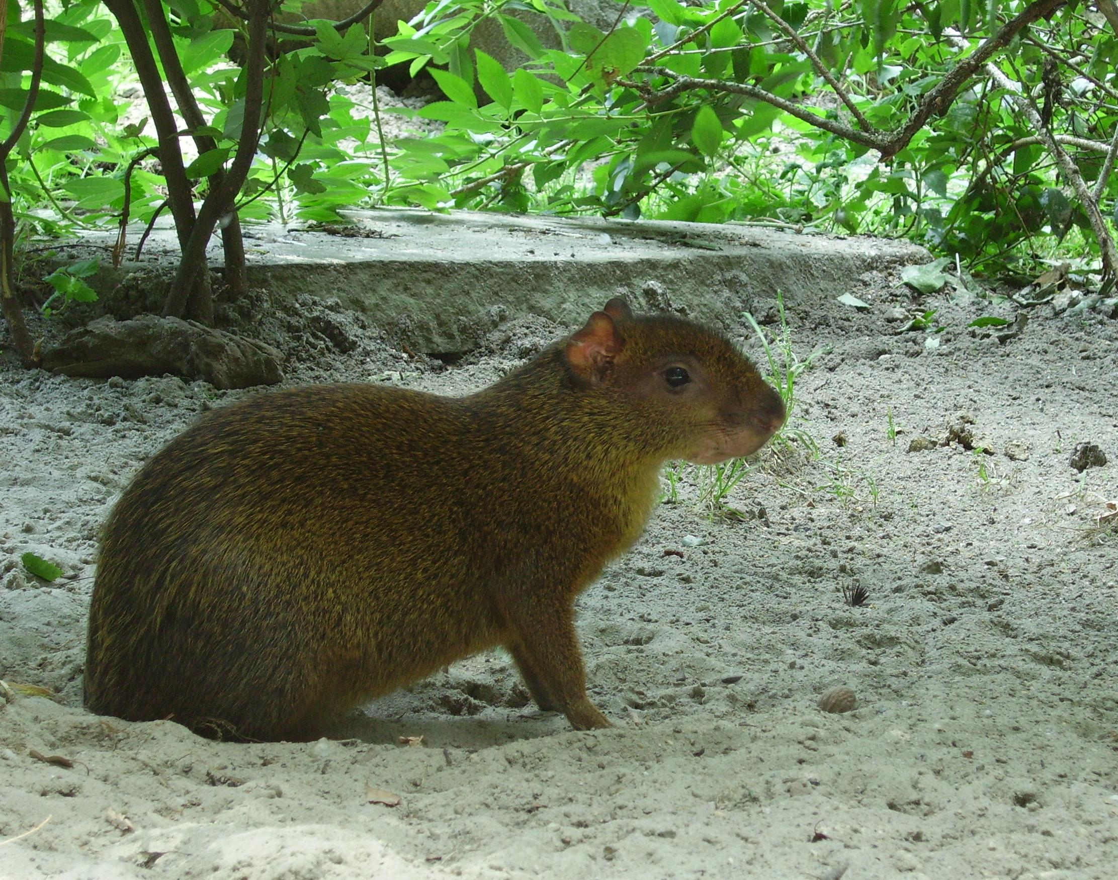 Aguti středoamerický, ZOO Ostrava